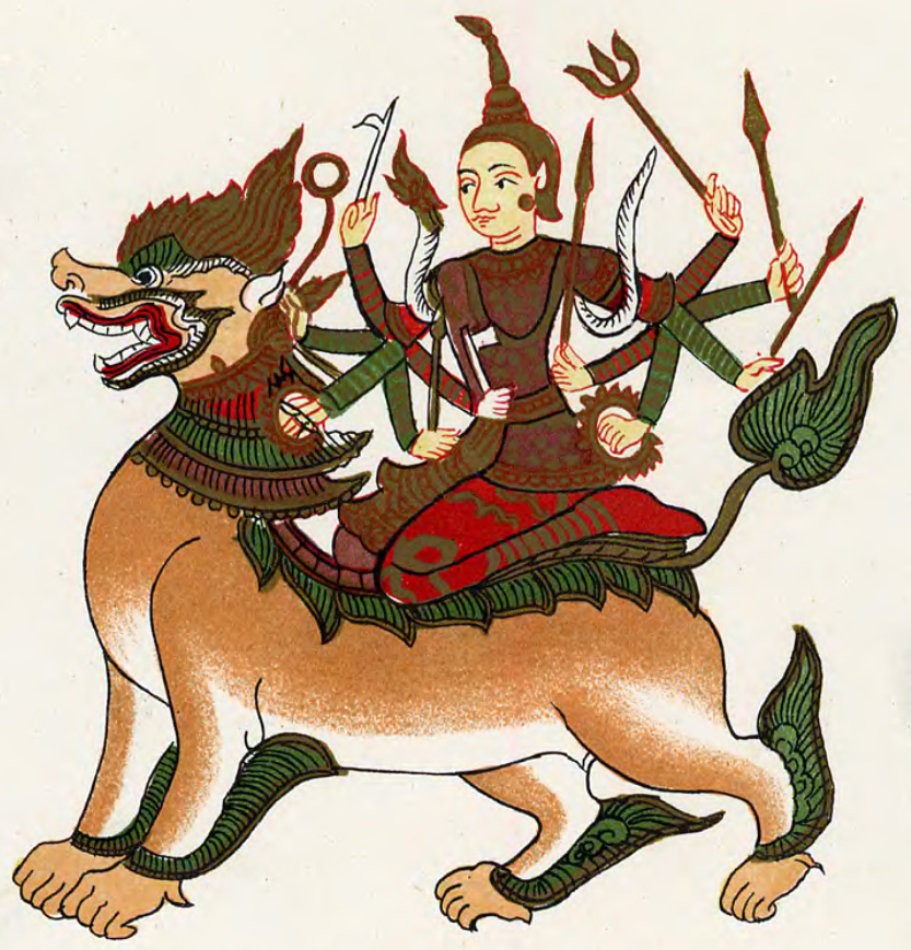 Chandi (Sandi Dewi) in Burmese representation